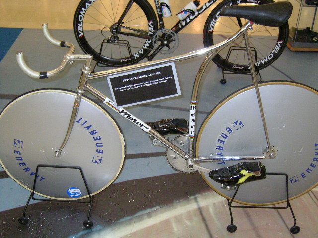 La speciale bicicletta a ruote lenticolari con la quale Francesco Moser stabilì il record dell'ora nel 1984